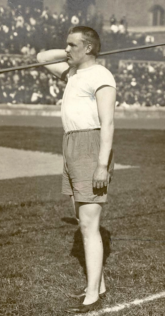 Yngve Häckner (9 August 1895 – 3 December 1987)